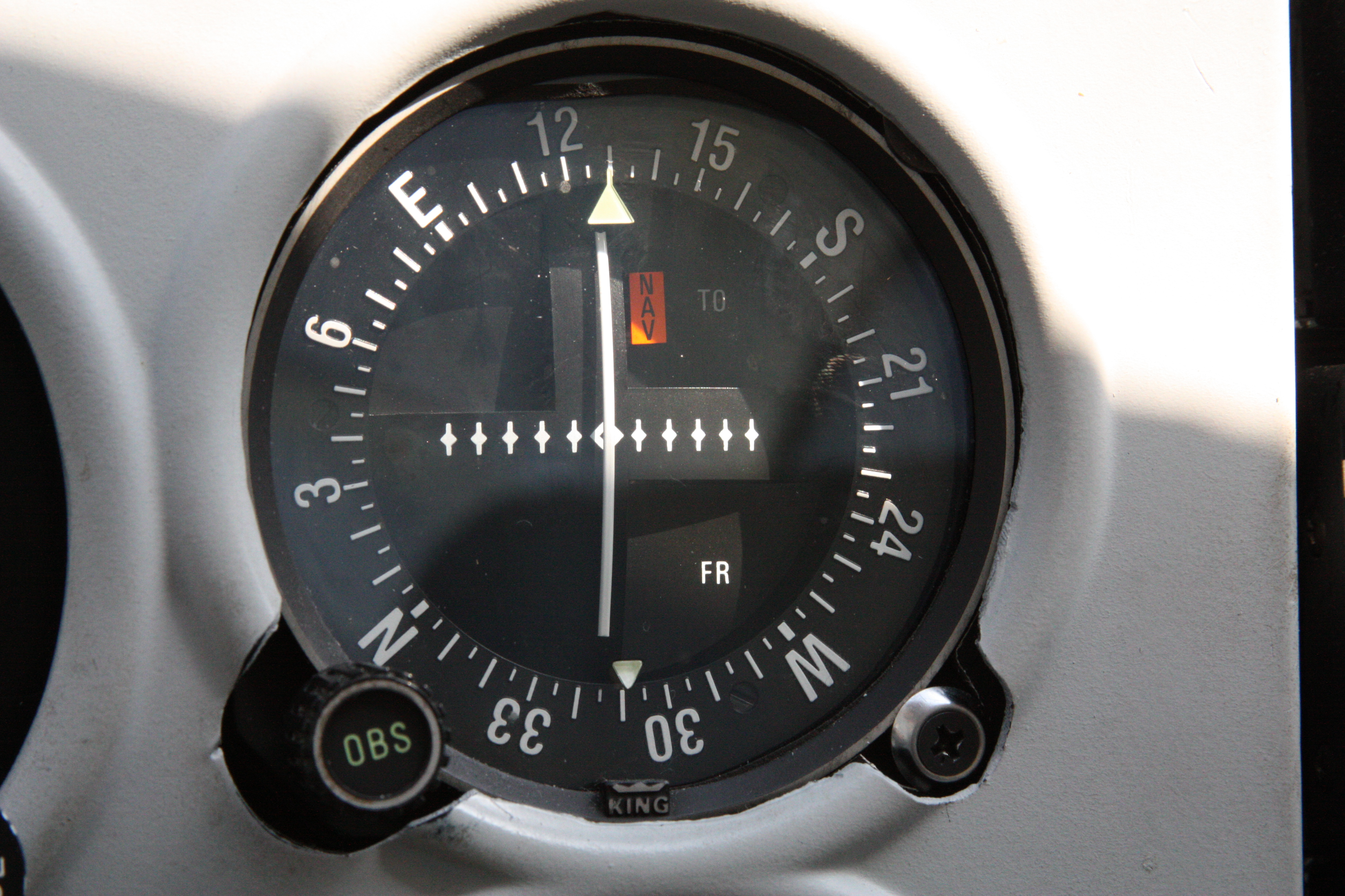 Cessna C172; cockpit instruments